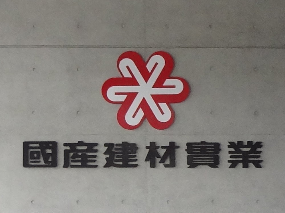 國產建材實業總部，2013年遷入臺北市內湖區新湖一路8號7樓（元太谷商業大樓）。此為本棟1樓大門前的國產建材實業商標。